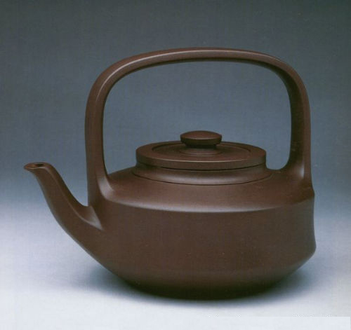 中文（中国大陆）: 顾景舟 提璧壶